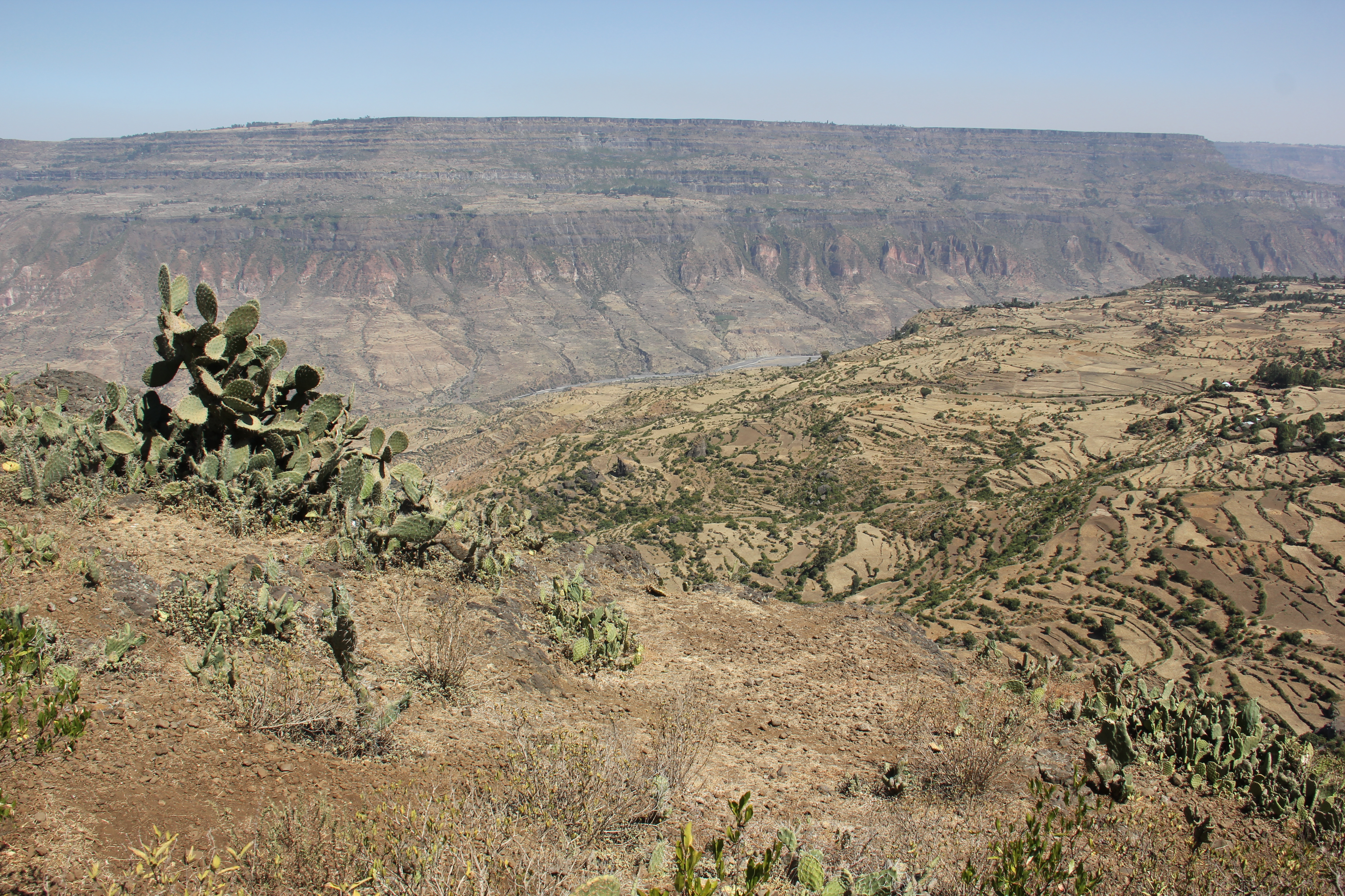 Jemma Gorge